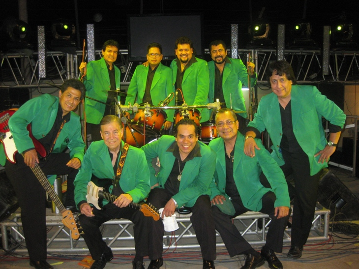 El flamazo musical de mexico "los flamers" foto tomada el dia del musico. Noviembre del 2011